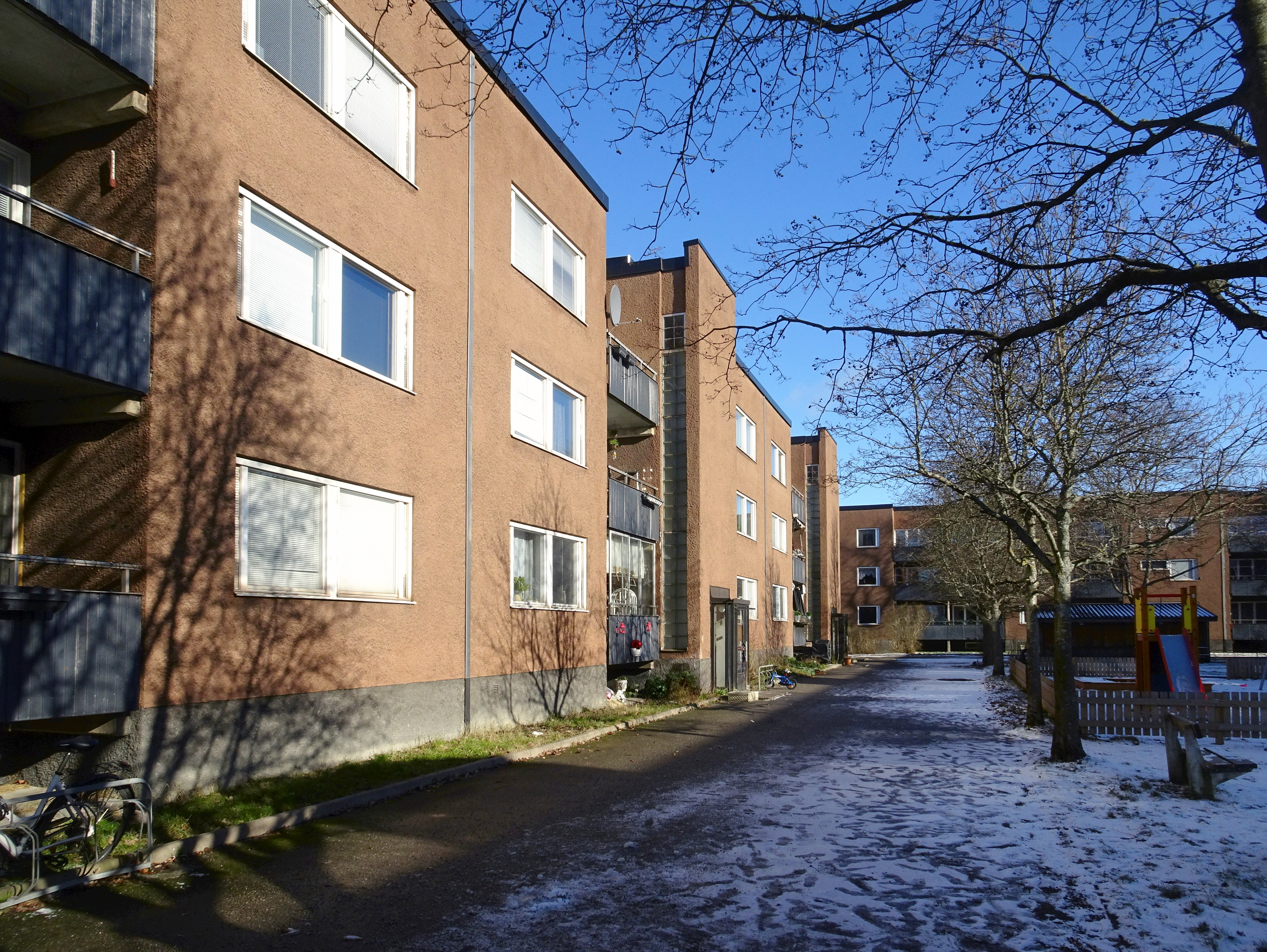 Kvarteret Bergholmen, Vårberg, Kjell Abramson arkitektkontor AB (Britta och Kjell Abramson) 1965-1967